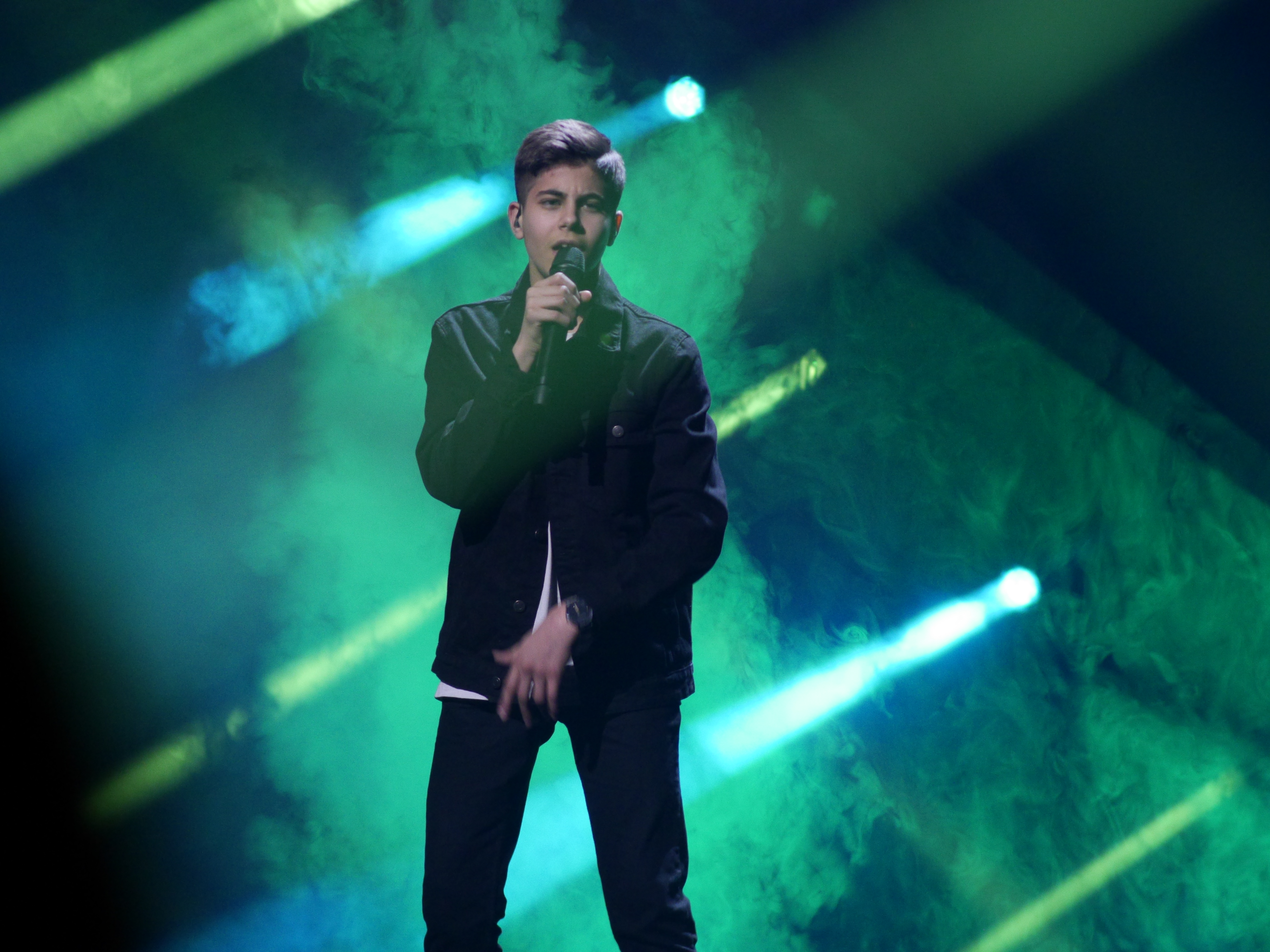 Melodifestivalen 2019 i Lidköping